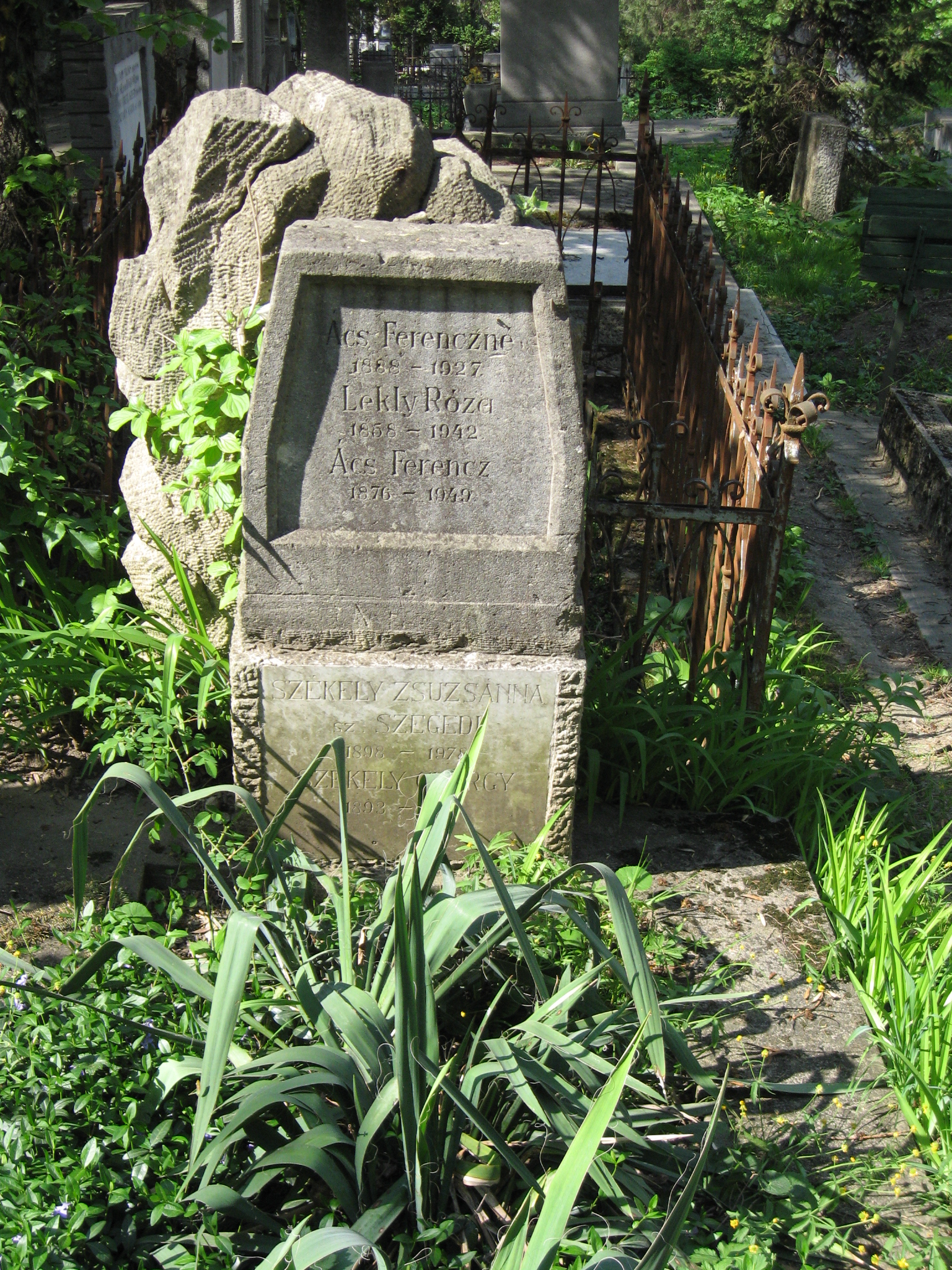 Ács Ferenc sírja a kolozsvári Házsongárdi temetőben.